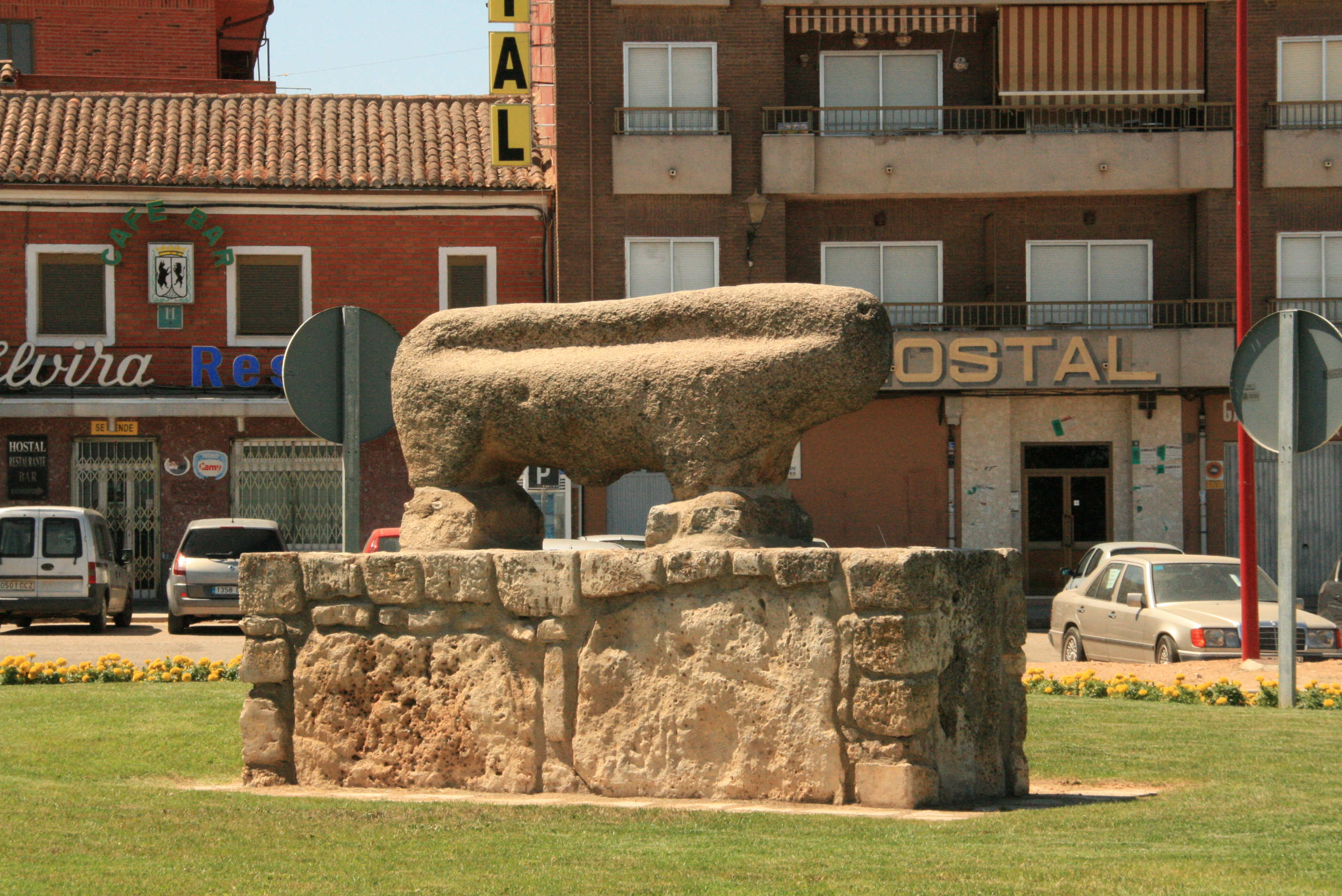 Verraco de piedra celtibérico en Toro (Zamora). De él tomó su nombre la localidad y definió también su blasón